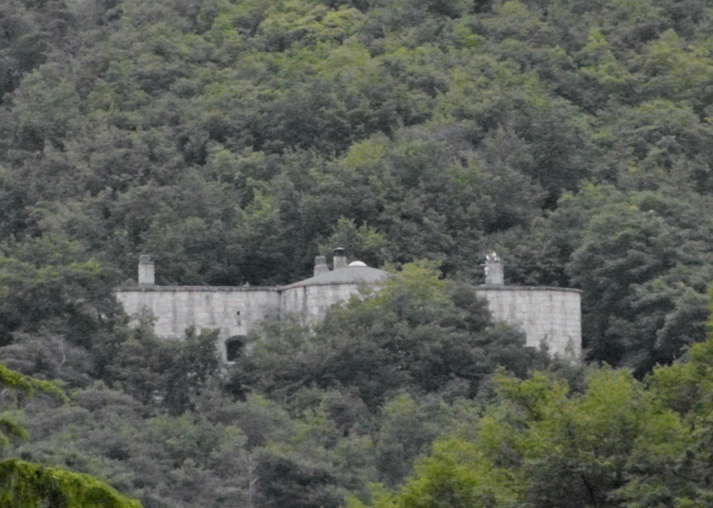 Forte Doss di Sponde